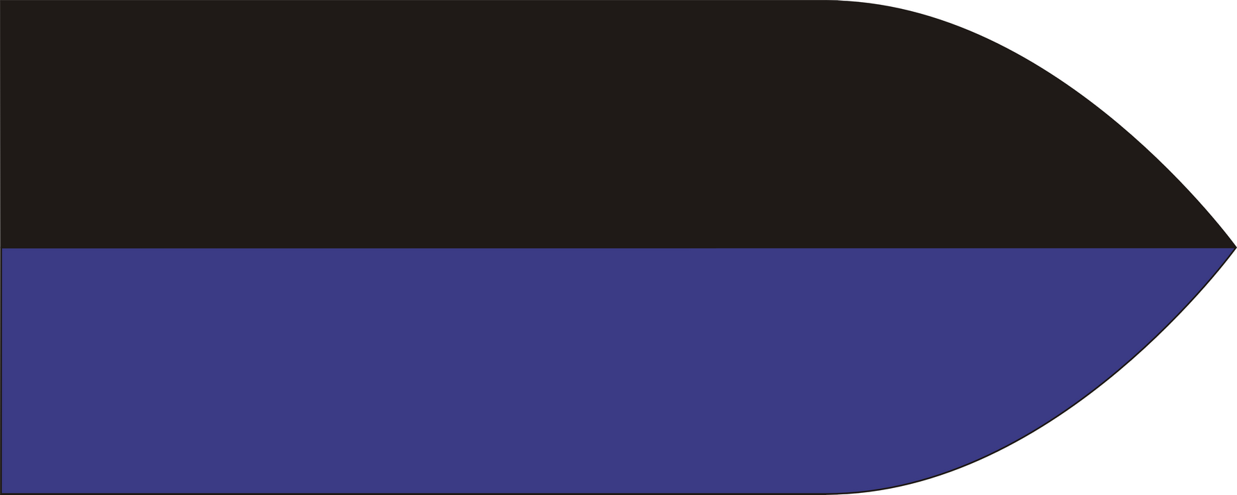 Barwy 4 Batalionu Łączności Polskich Sił Zbrojnych na Zachodzie